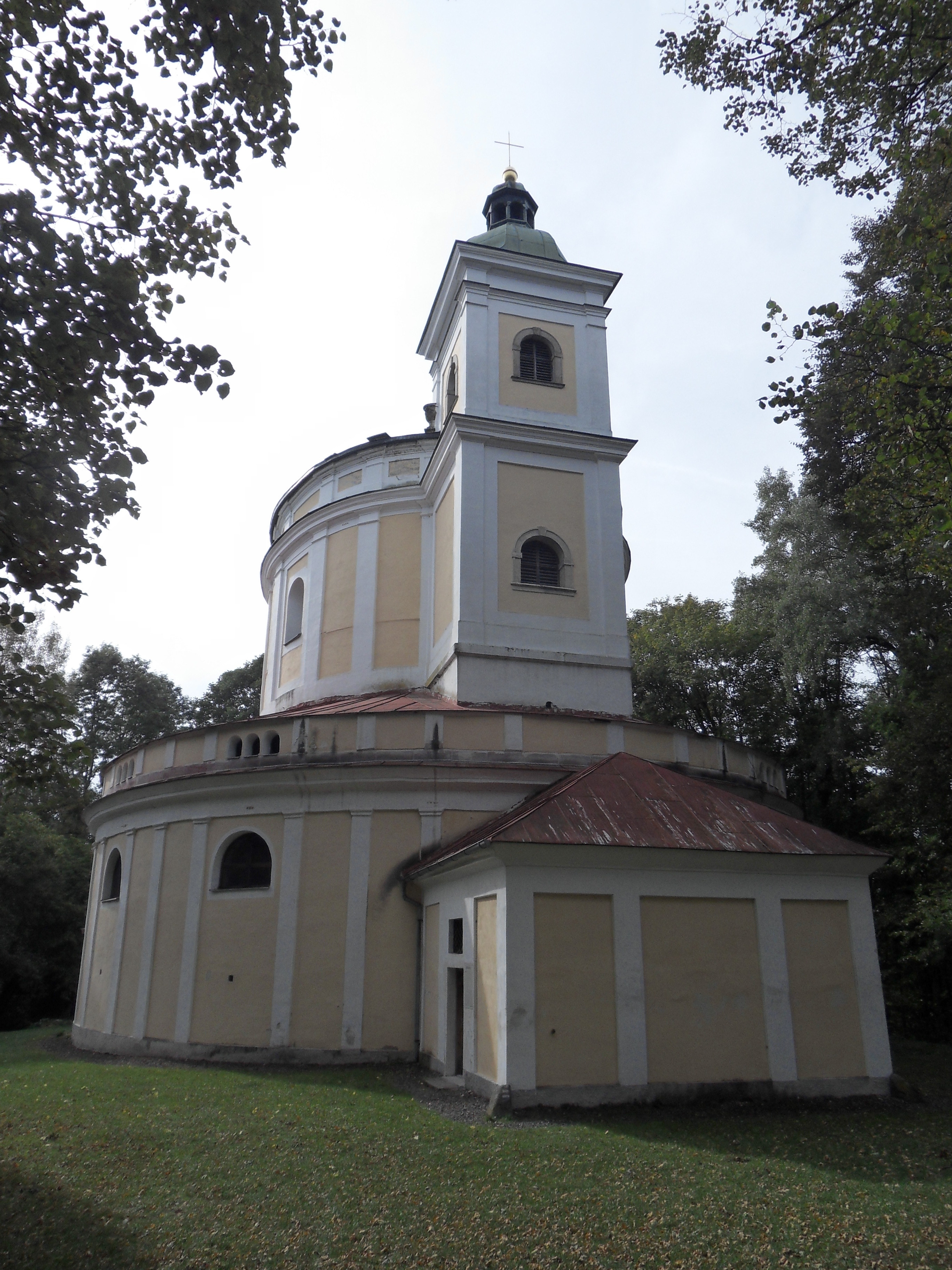 Pohled od severovýchodu na kostel svaté Anny (Tanaberk) na návrší severovýchodně od vsi, Hájek (Všeruby).